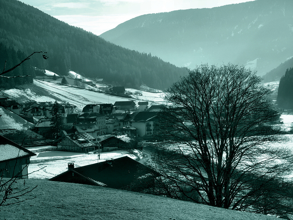 Panoramica, Campolasta, Alto Adige, Italy.Winter (Astfeld #3)